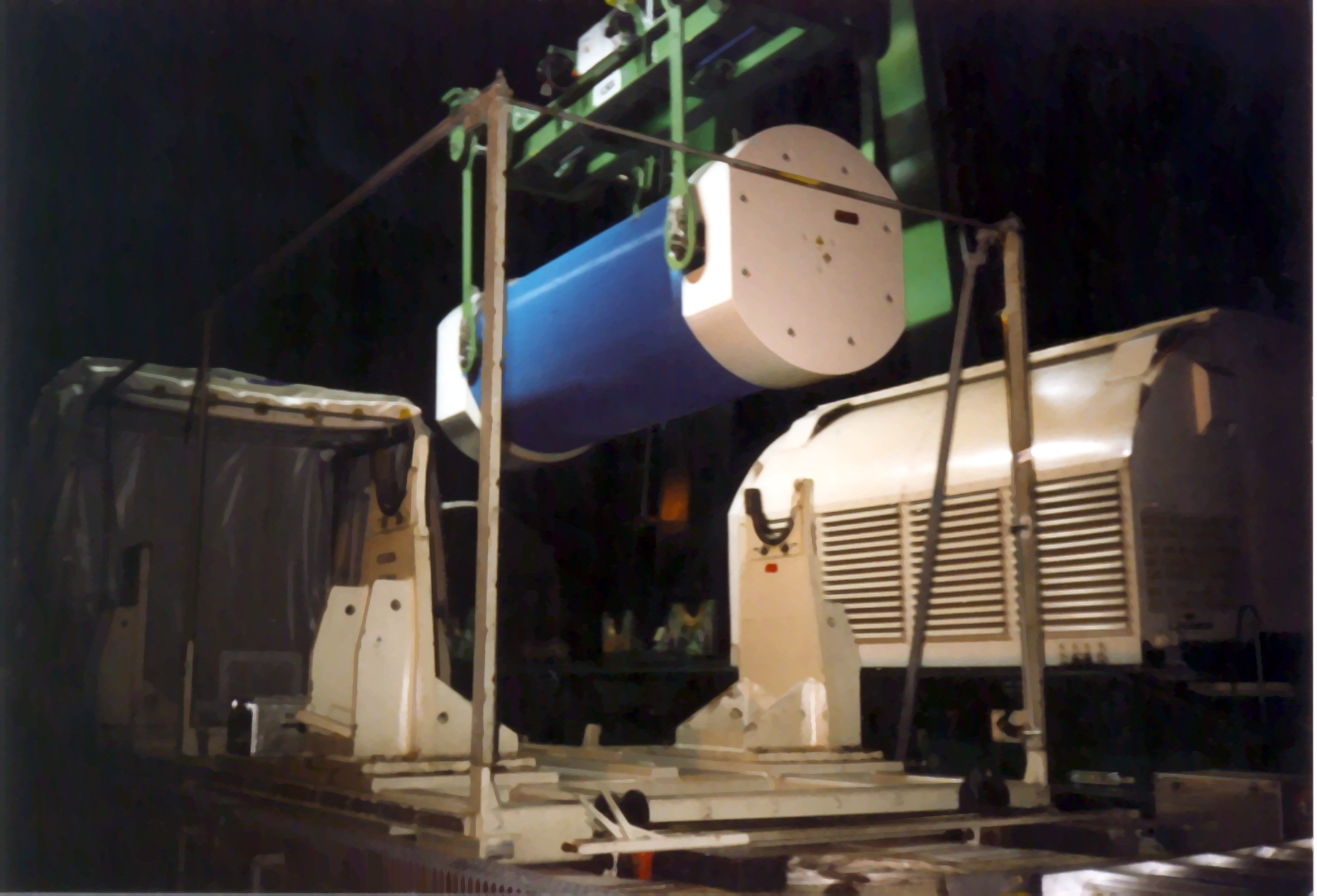 Verladung eines Castor-Behälters im März 2001 in Dannenberg; 10. Castortransport nach Gorleben/Wendland